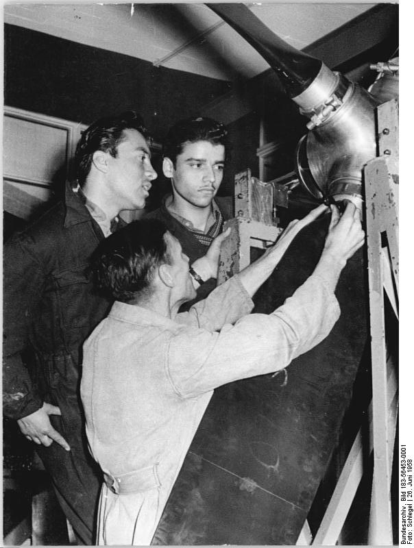 Dresden, libanesische Studenten der TH Zentralbild Schlegel 26.6.1958 Arabische Studenten verurteilen amerikanische Kriegsabsichten im Libanon. Arabische Studenten an der Technischen Hochschule Dresden, die gegenwärtig ihr Berufspraktikum im Industriewerk Karl-Marx-Stadt absolvieren, billigen vollinhaltlich die jüngste Erklärung der sowjetischen Nachrichtenagentur TASS zur Libanonfrage. Der libanesische Student Adnan Mumneh bezeichnete die Erklärung als einen Beweis für die Sorge um den Frieden und für die Sympathie mit den Bestrebungen seines Volkes, die nationale Unabhängigkeit zu bewahren. Der syrische Student Soliman Jusef wies darauf hin, dass das Kesseltreiben gegen den Libanon eine Fortsetzung der Politik der von allen arabischen Völkern gehassten Eisenhower-Doktrin sei. (Siehe ADN-Meldung Nr. 231 v. 26.6.1958) UBz: Abteilungsmeister Willi Friedrich (vorn Mitte) im Gespräch mit dem libanesischen Studenten Adnan Mumneh und Soliman Jusef aus Syrien am Auswuchtstand.